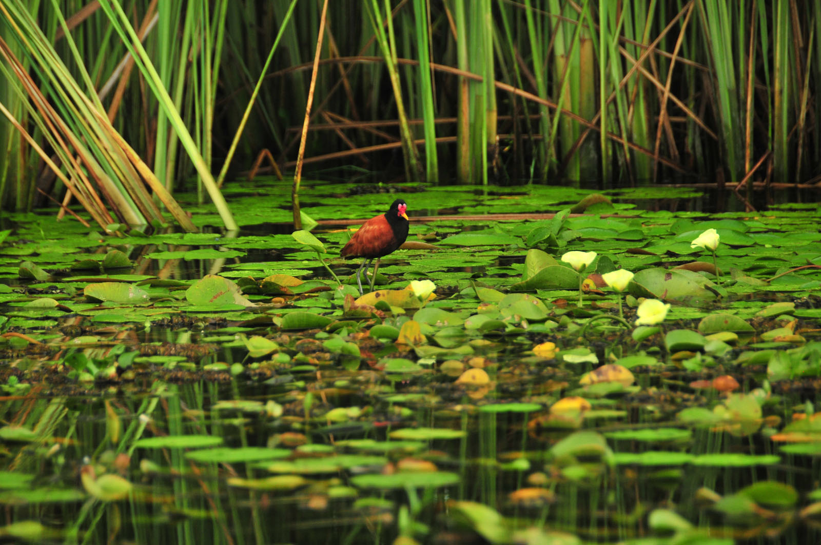 Gallito de agua. Avifauna en los Esteros del Iberá. Fotos de los Esteros del Iberá en Argentina